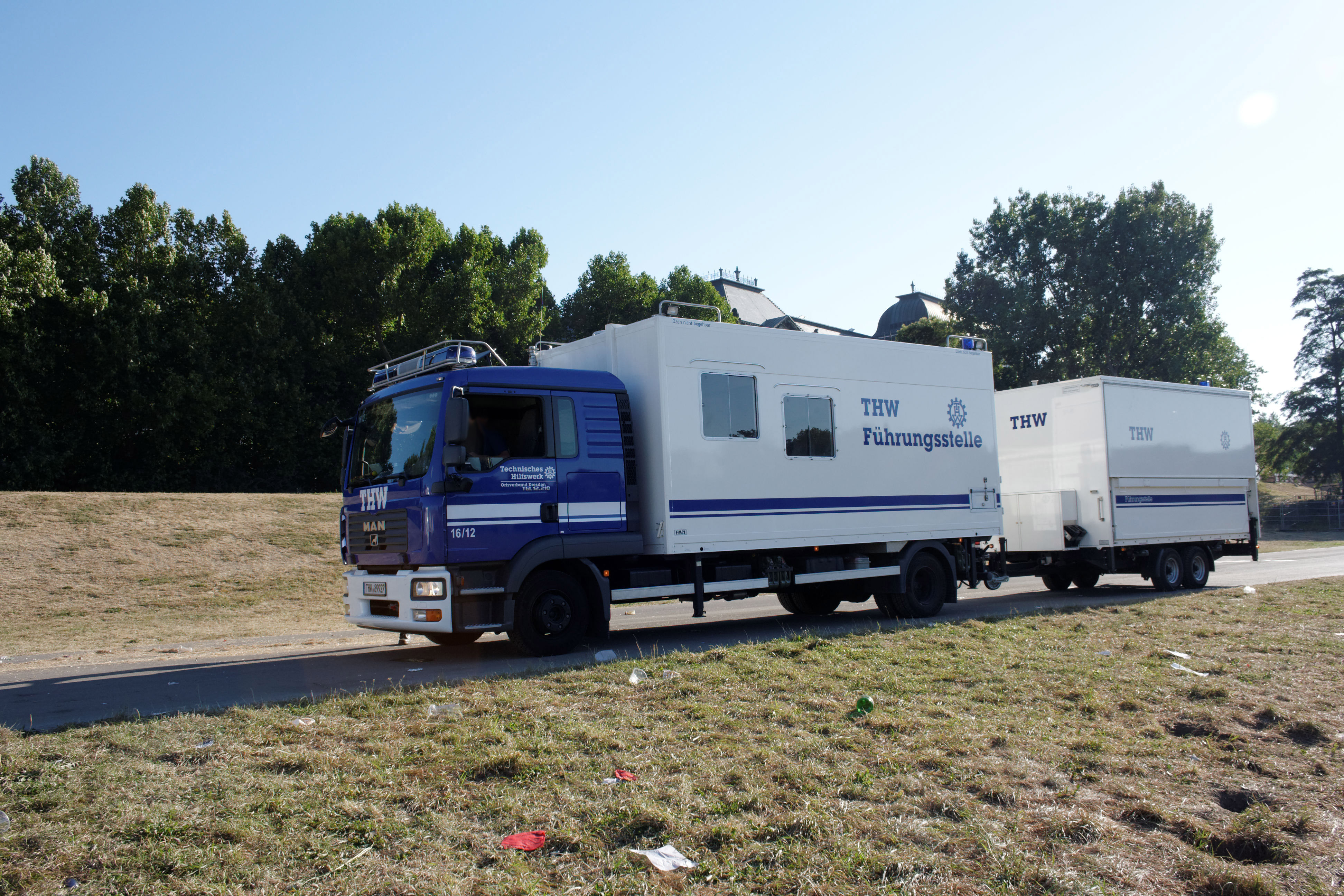 Führungs- und Kommunikationskraftwagen (mit Anhänger Führung und Lage) der Fachgruppe Führung und Kommunikation des Technischen Hilfswerk